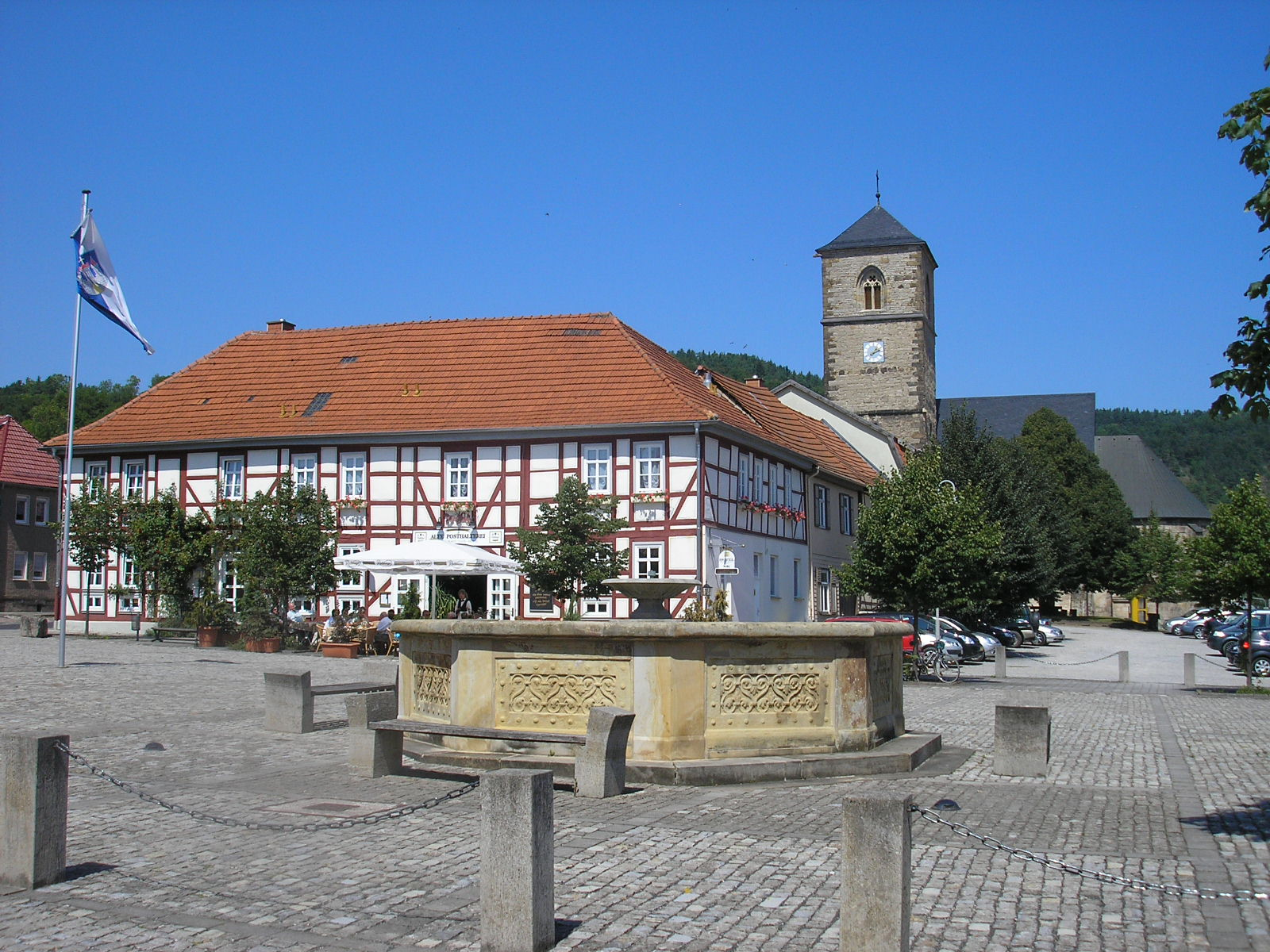 In der Creuzburger Altstadt - Marktbrunnen auf dem "Plan".